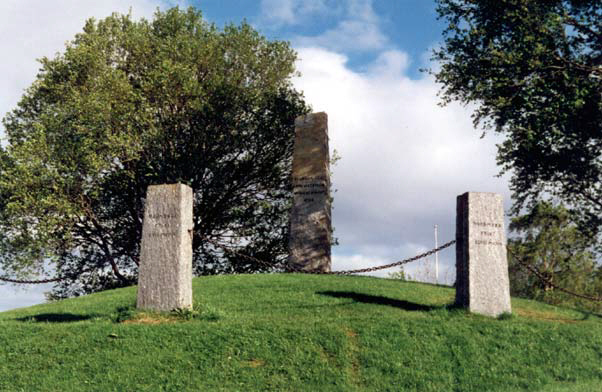 Norsk forsvarshistorie: Tinghaugen på Frosta hvor Frostatinget ble holdt. Bildet er tatt sommeren 2004 av Toreau.